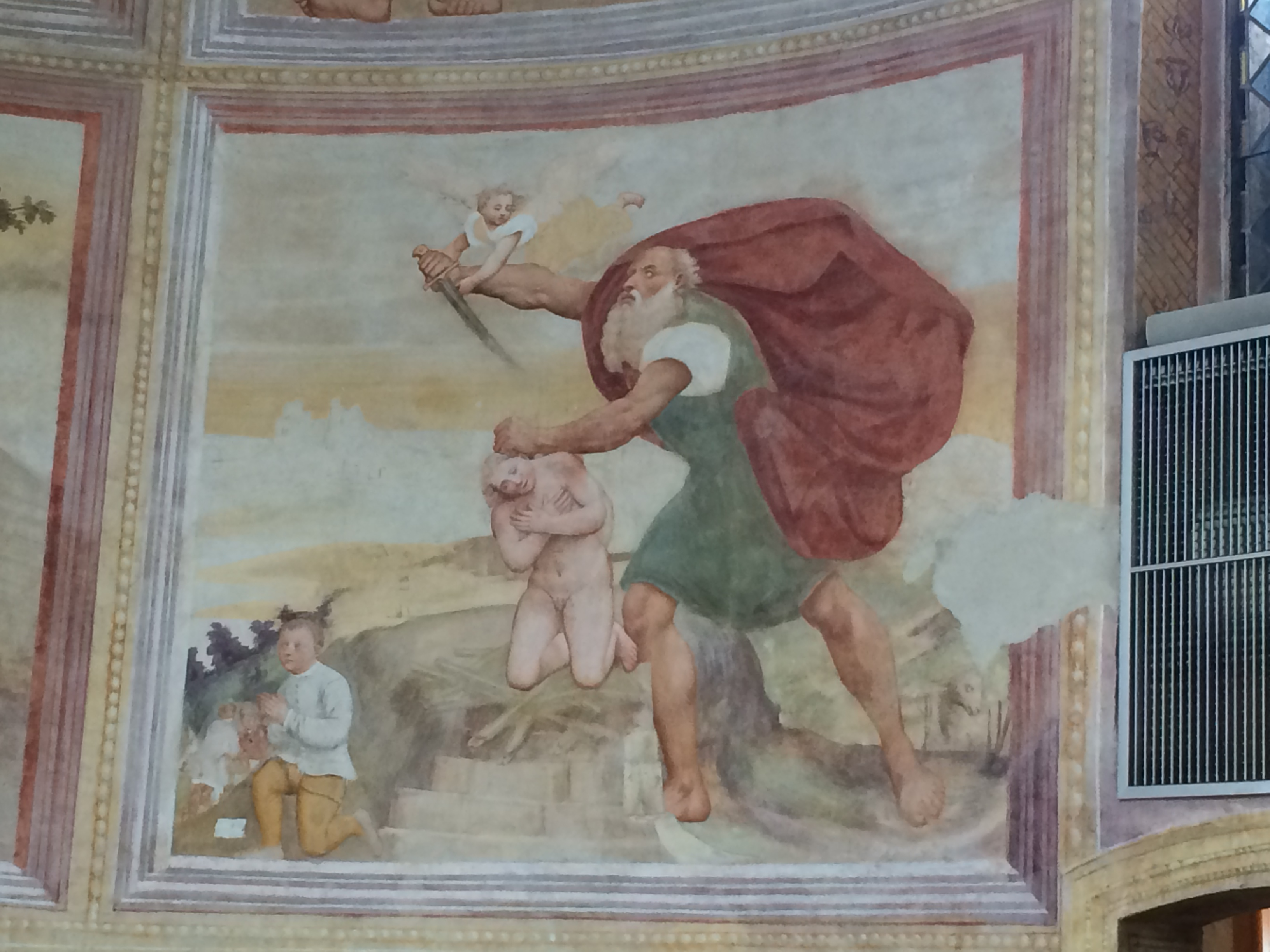 Pordenone - Chiesa Santa Trinità - Sacrificio di Isacco.jpgaffresco